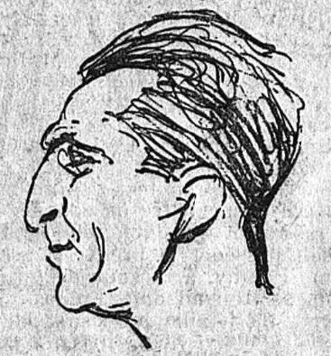 Maurice Bouton, rameur, en avril 1924